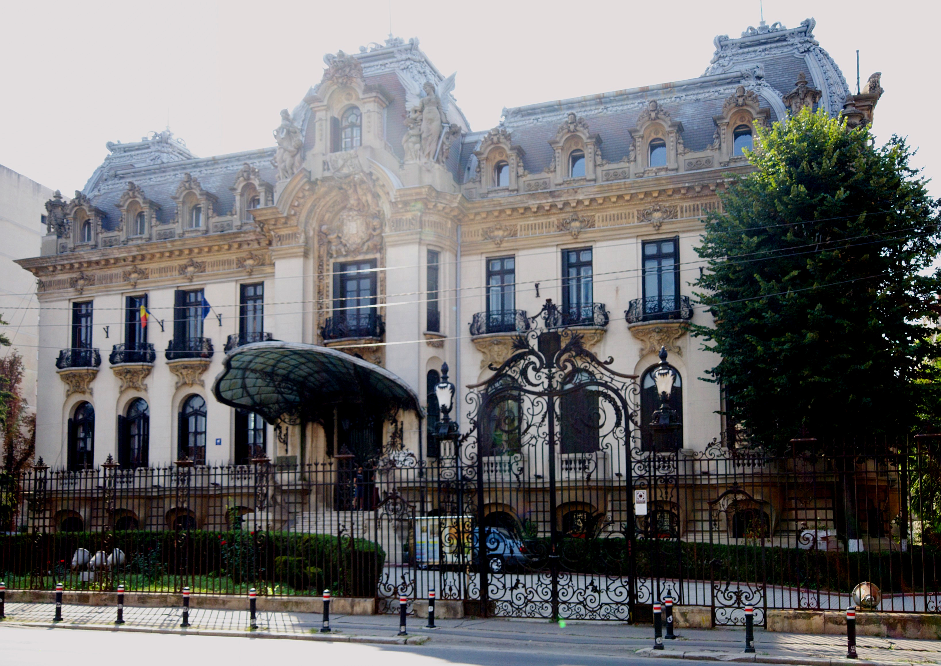 Palatul Cantacuzino, Calea Victoriei 141